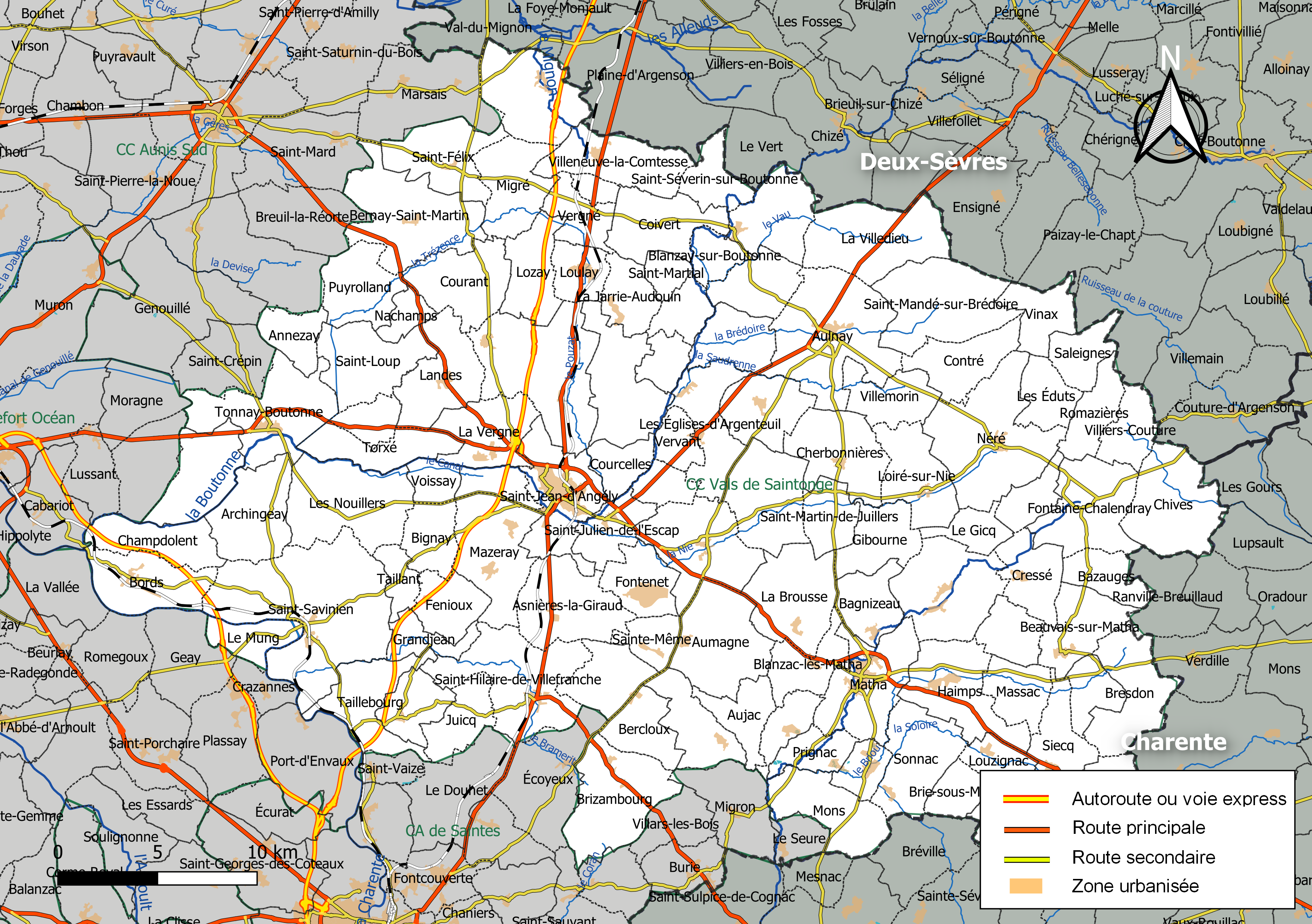 Carte géographique de l'intercommunalité Vals de Saintonge Communauté, département de la Charente-Maritime, France. Composition au 1er janvier 2019.